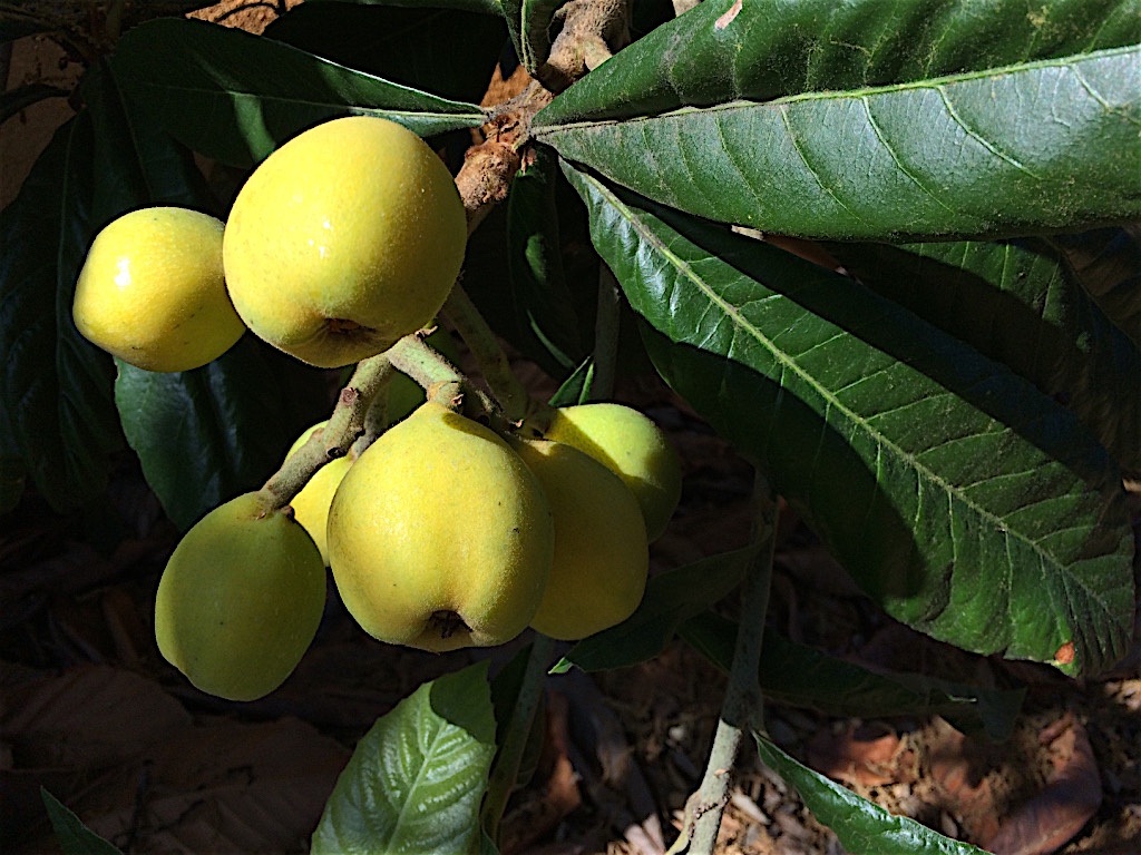 Do meu jardim, comprada numa Nursery na Lake Ave, Pasadena, California. Plantada ha cerca de 3 anos atras. Uma fruta deliciosa, com sabor único, com grande caroço marrom.